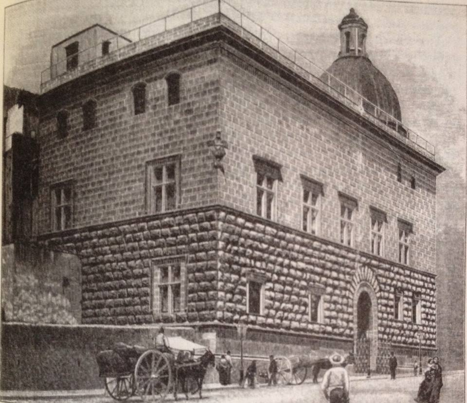 Napoli, via Duomo - Palazzo Como, oggi Museo Filangieri. Autore sconosciuto.